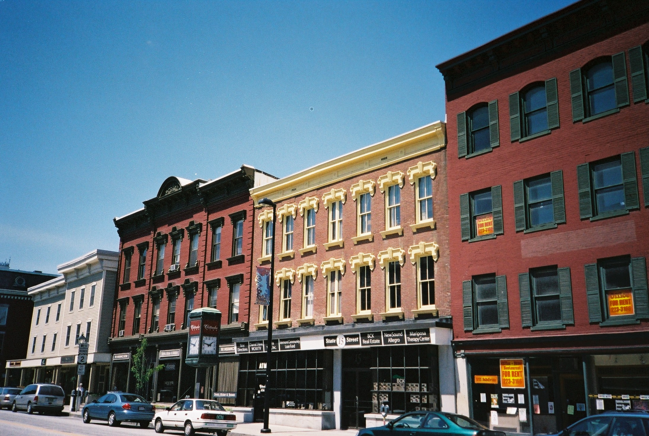 Auteur : FC Georgio Sujet : Centre-ville de Montpelier Lieu : Vermont, États-Unis Date : juillet 2006